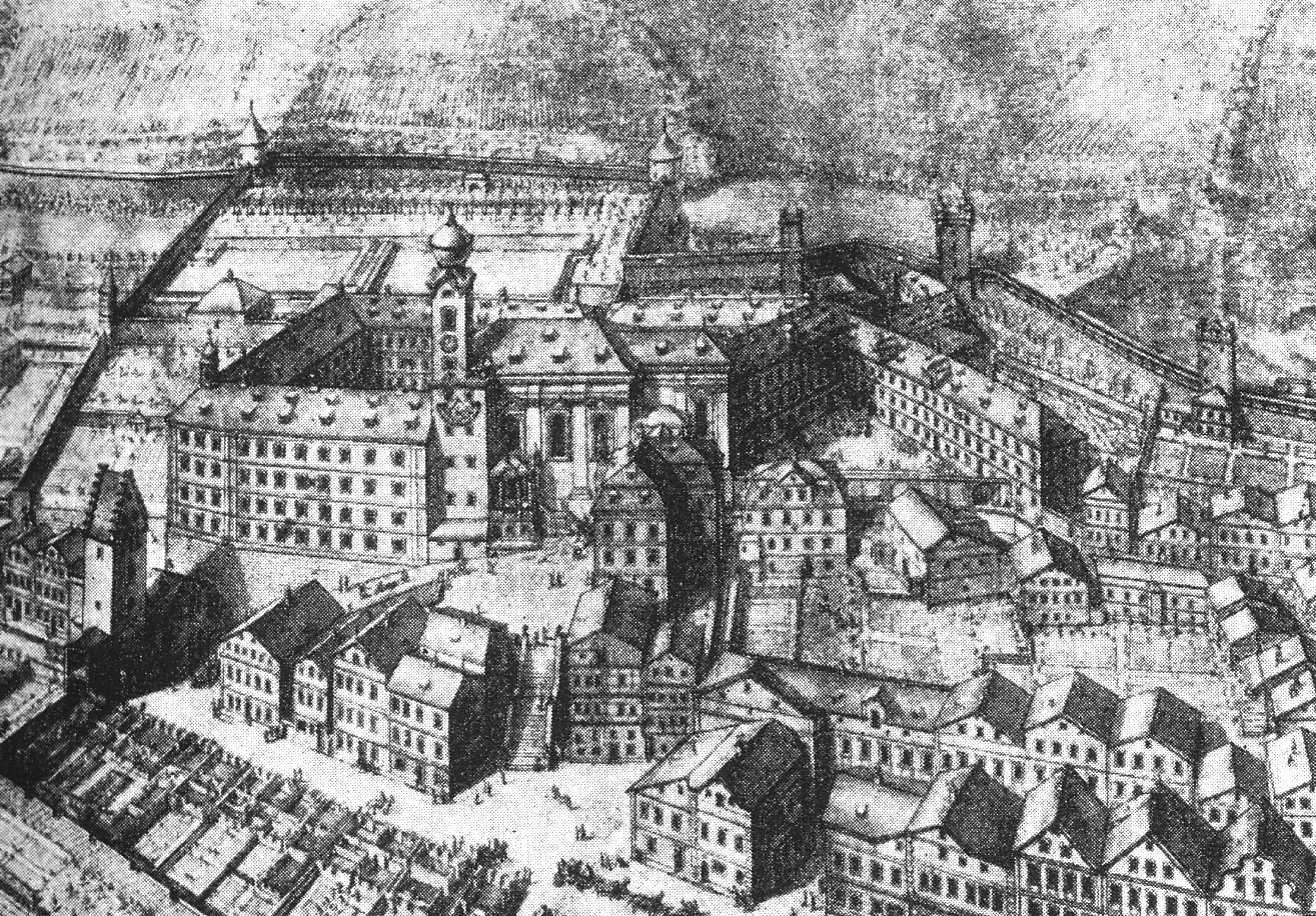 Eichstätt um das Kloster St. Walburg. Zeichnung von Maurizio Pedetti 1794